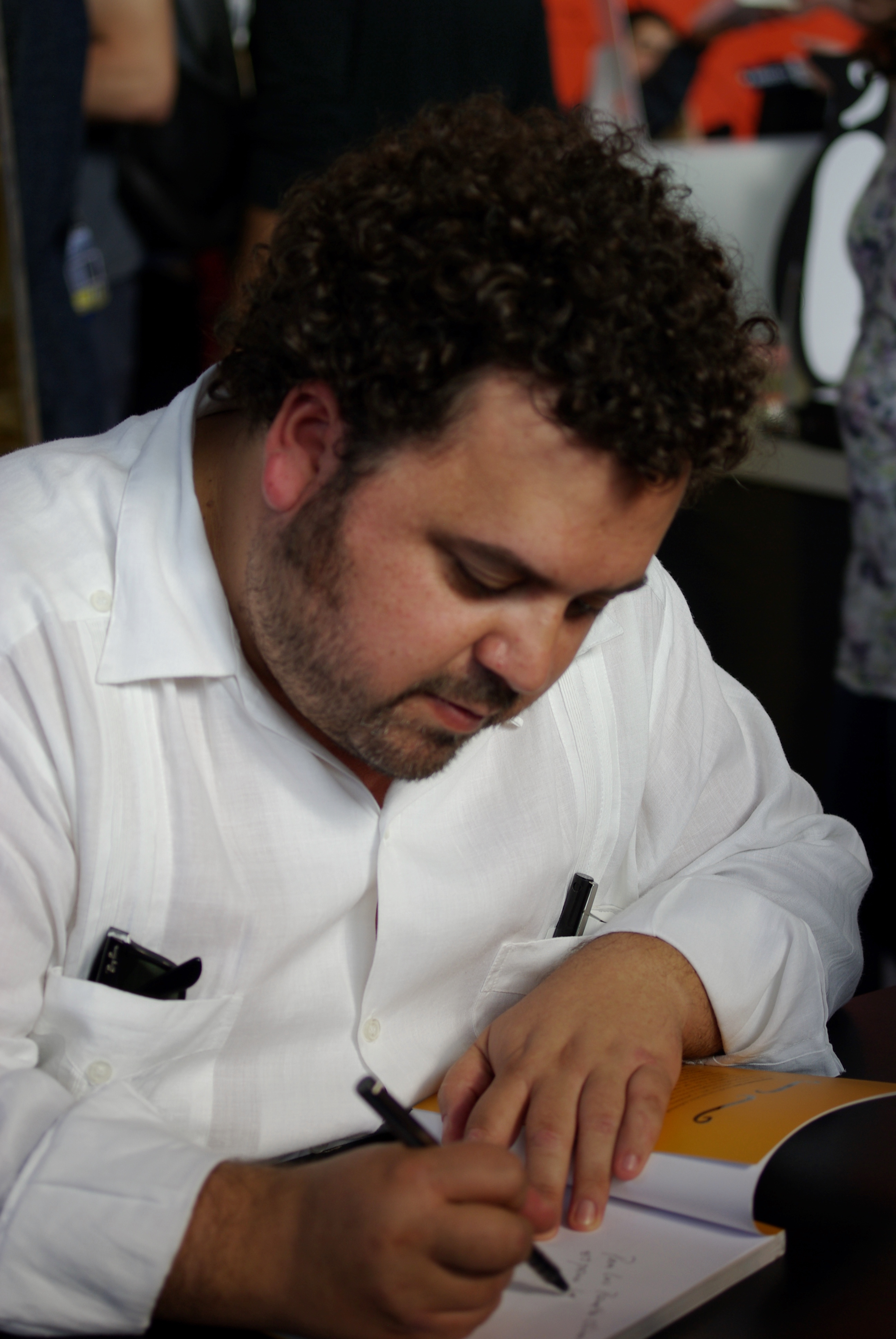 El crítico gastronómico Álvaro Peralta, conocido como Don Tinto, firma ejemplares de su libro 25 lugares imprescindibles donde comer en Santiago durante la Feria Internacional del Libro de Santiago 2016